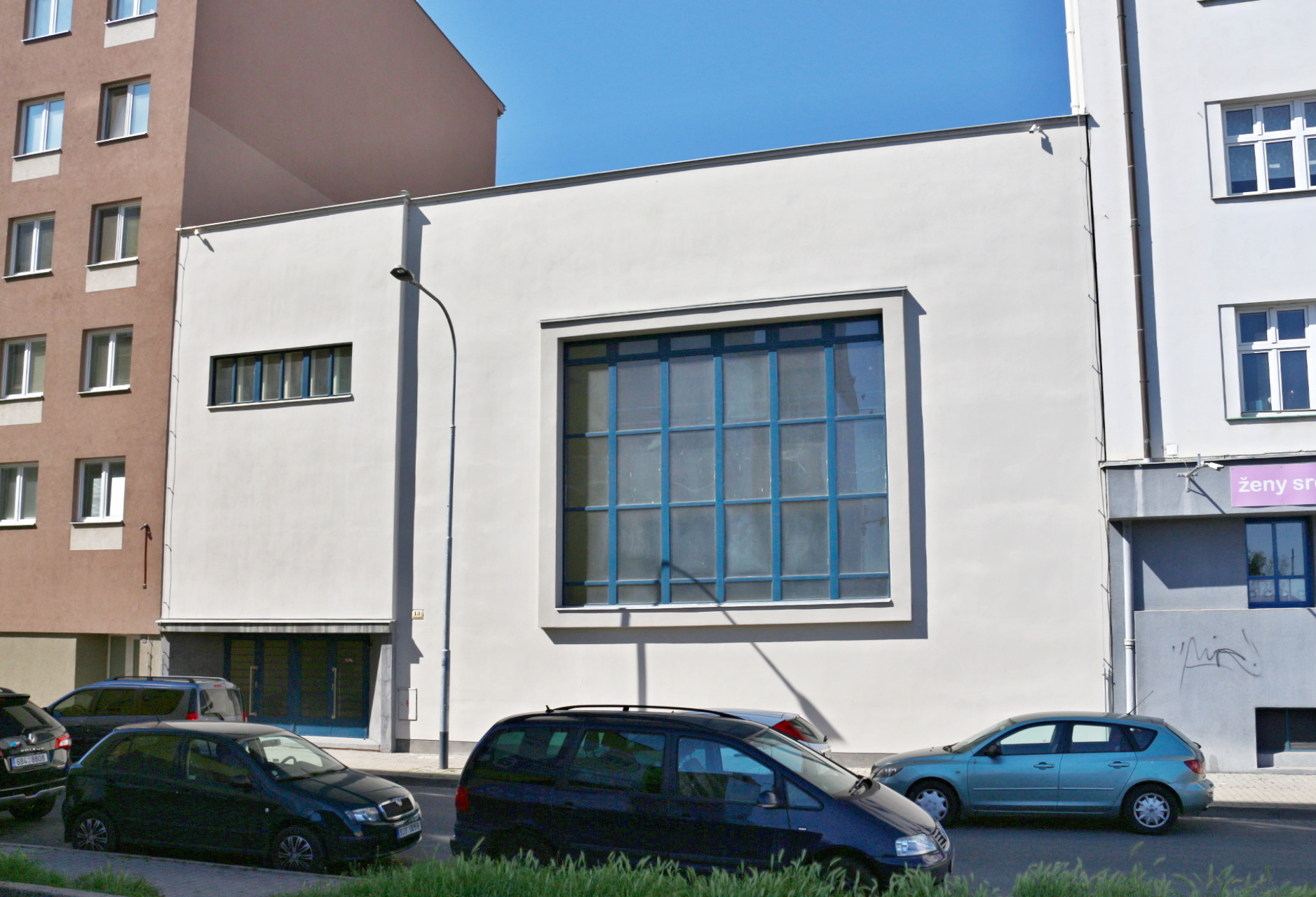 Synagoga Agudas achim, Brno